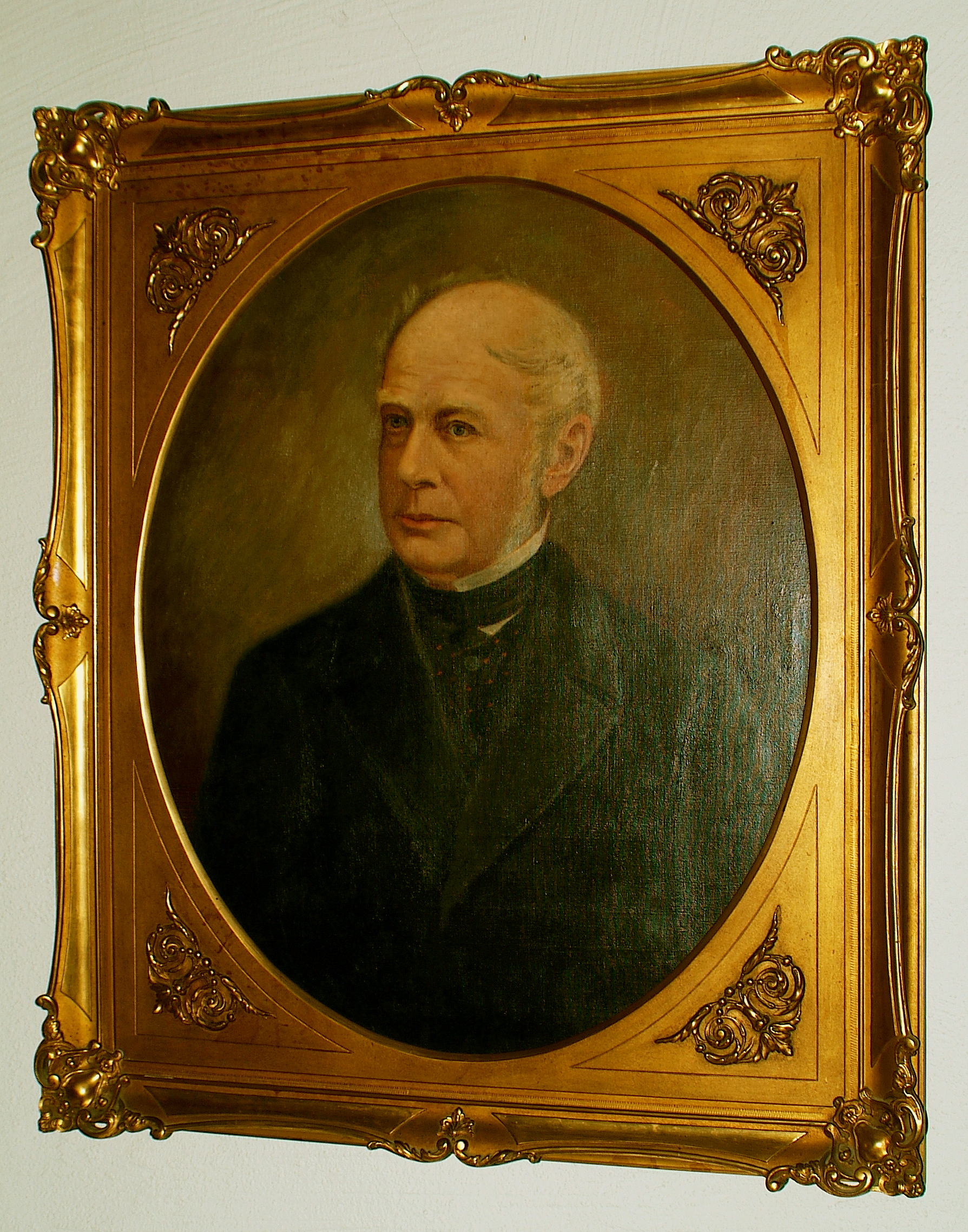 Eberhard Friedrich von Graevemeyer (1805-1892) war hannoverscher Oberamtmann in Ohsen und Polle. Er heiratete die 1817 in London geborene Charlotte Weston-Jacob, mit der er vier Kinder hatte. Das Foto wurde aufgrund der Blitzlicht-Reflexion von schräg rechts aufgenommen und sollte frontal ohne Blitz und mit Langzeitbelichtung noch einmal neu aufgenommen werden ...